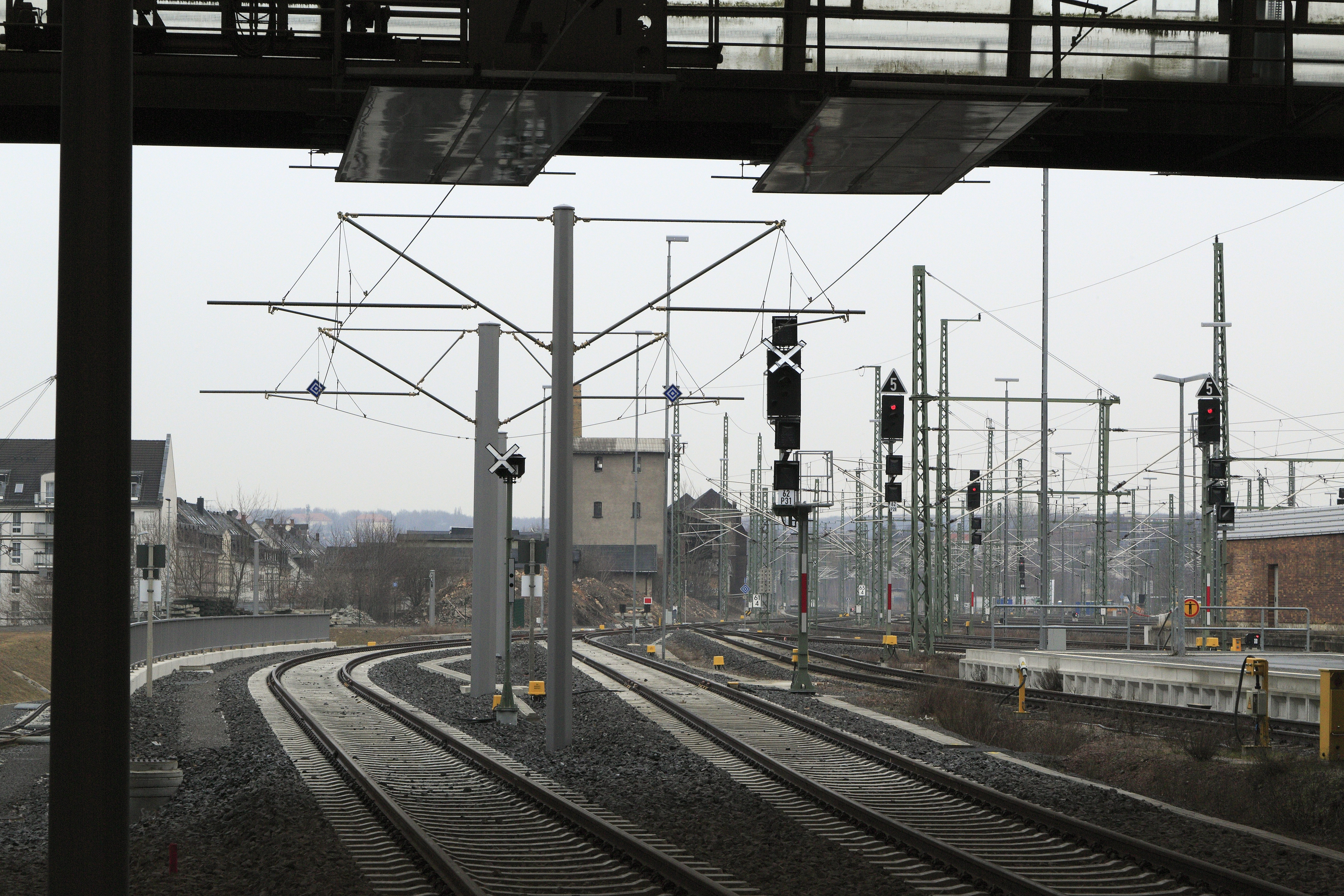 Gleise 32 und 31 (Bahnsteige 3 und 4) Richtung Hilbersdorf (–Niederwiesa und Flöha), durchgehende Fahrleitung mit Systemwechselstelle wird es hier auf absehbare Zeit nicht geben. Bis auf die Verbindung nach Mittweida sind die denkbaren Strecken der Citybahn derzeit nicht elektrifiziert, damit sind Zweikrafttriebwagen unverzichtbar. Auf Höhe der Signale liegen die an den gelben Federklemmen erkennbaren doppelten Abriegelstöße zwischen Wechsel- und Gleichspanungsbereich. Wegen des Straßenbahnbetriebes besteht Richtungsbetrieb, entgegen der Regelfahrrichtung reicht deshalb ein Lichtsperrsignal. Für fallweise endende Züge besteht auf der Bahnhofstraße eine Notkehrmöglichkeit.